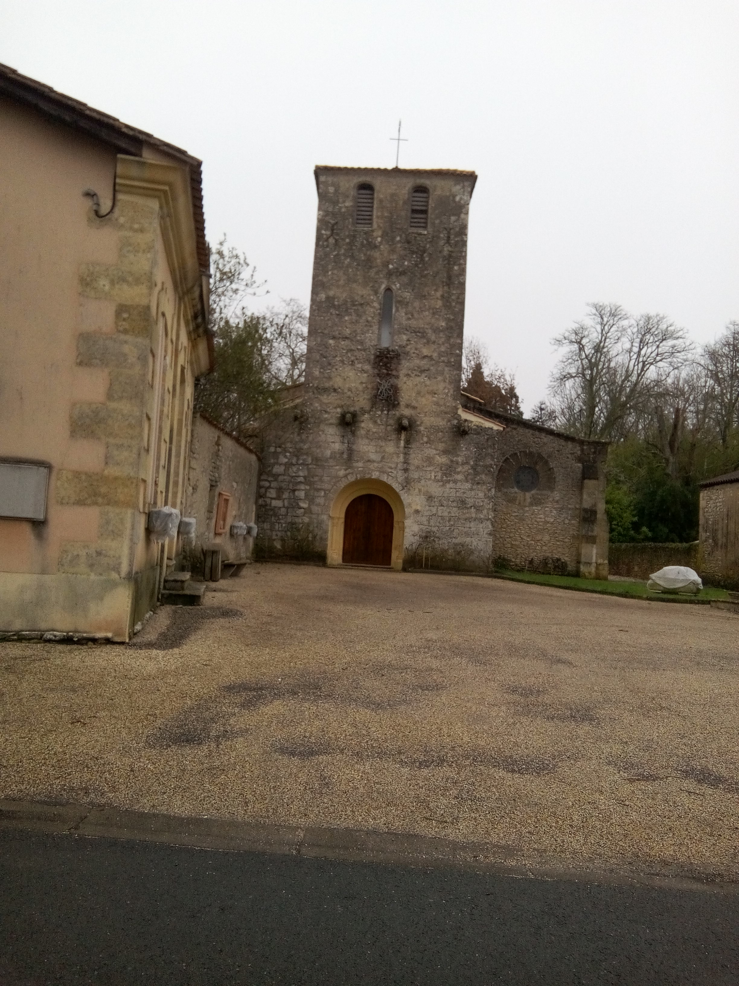 Église de Saint-Genès-de-Blaye